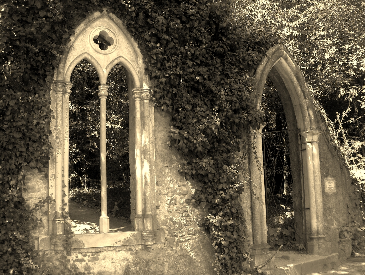 Quinta das Lágrimas em Coimbra